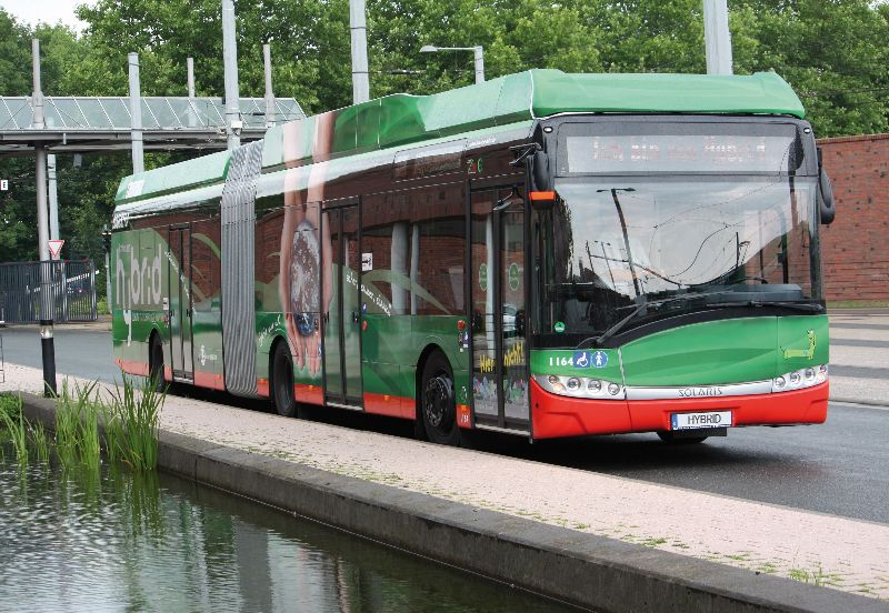 18 Hybrid Voith